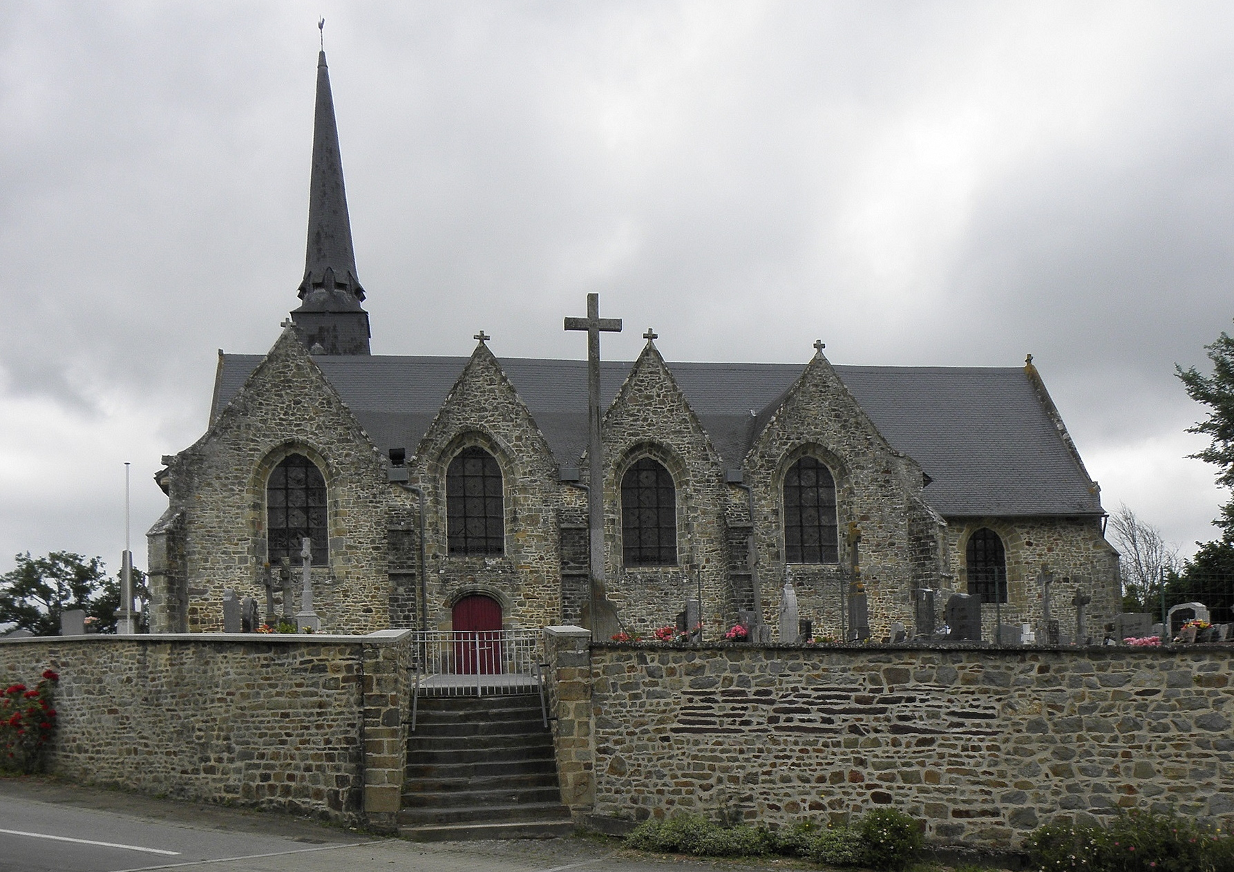 Église Saint-Pierre de Drouges (35). Façade méridionale.